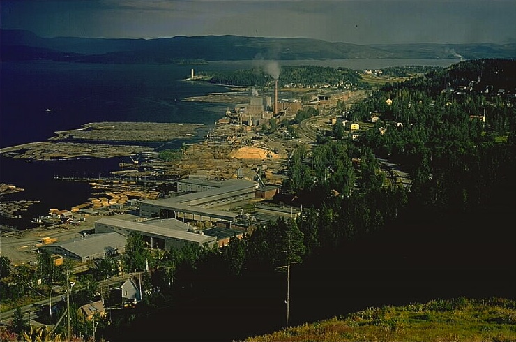 Väja, Kramfors kommun. Utsikt från skidbacken i Väja mot sågverket och massafabriken. Bilden troligen från slutet av 1960-talet.